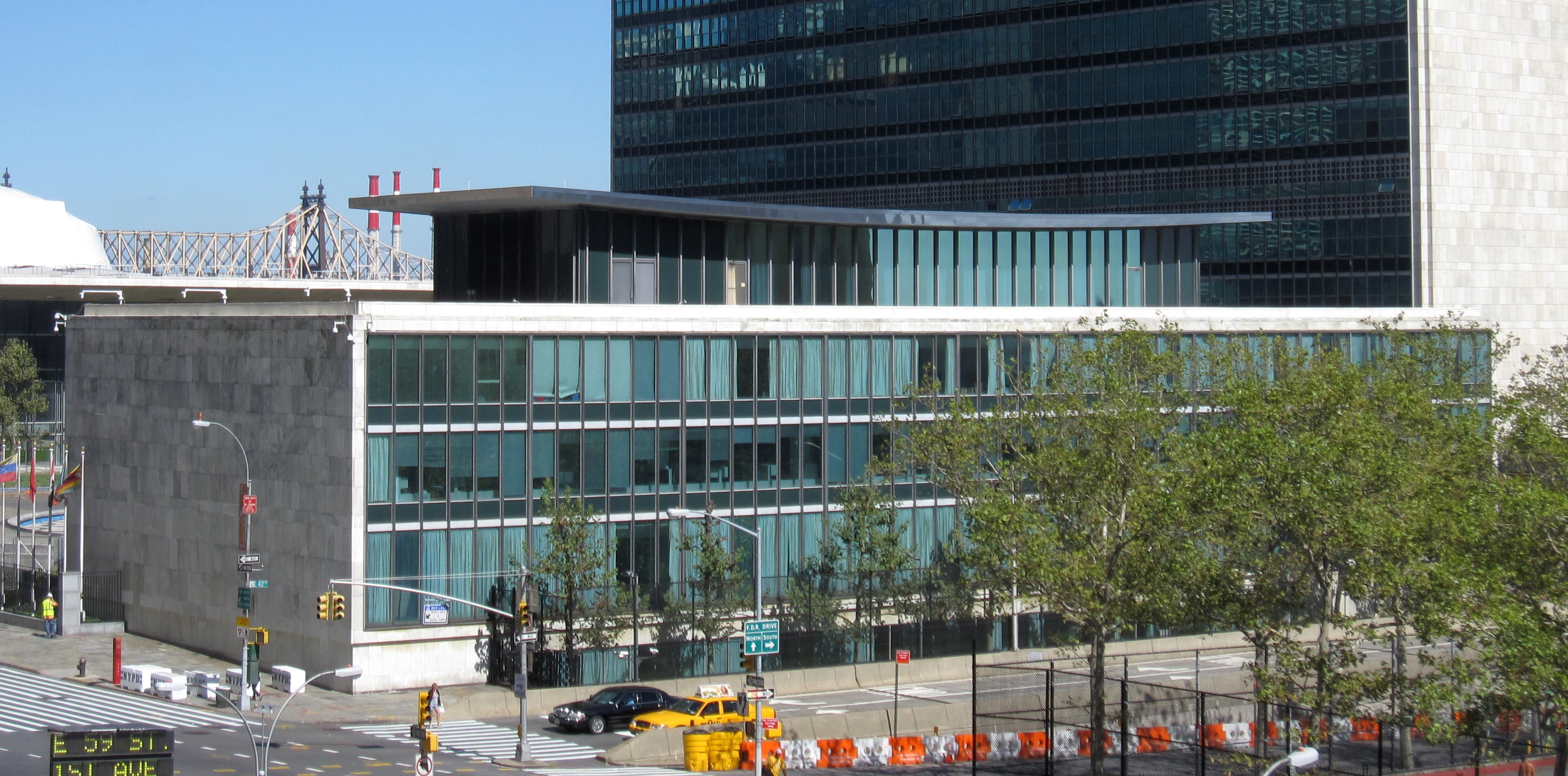 Dag Hammarskjöld Library